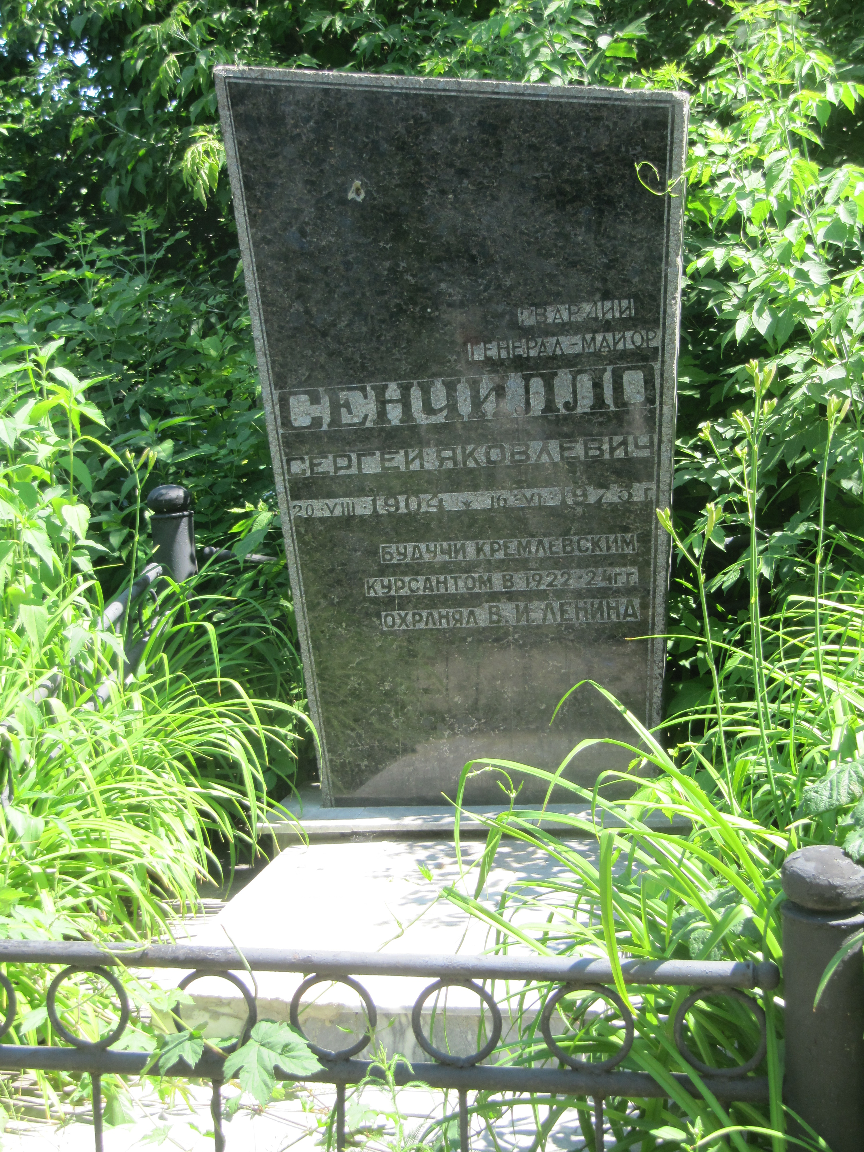 Могила Сенчилло Сергея Яковлевича (1904-1973), генерал-майора: Воскресенское кладбище (центральная аллея, 1й участок), Саратов.